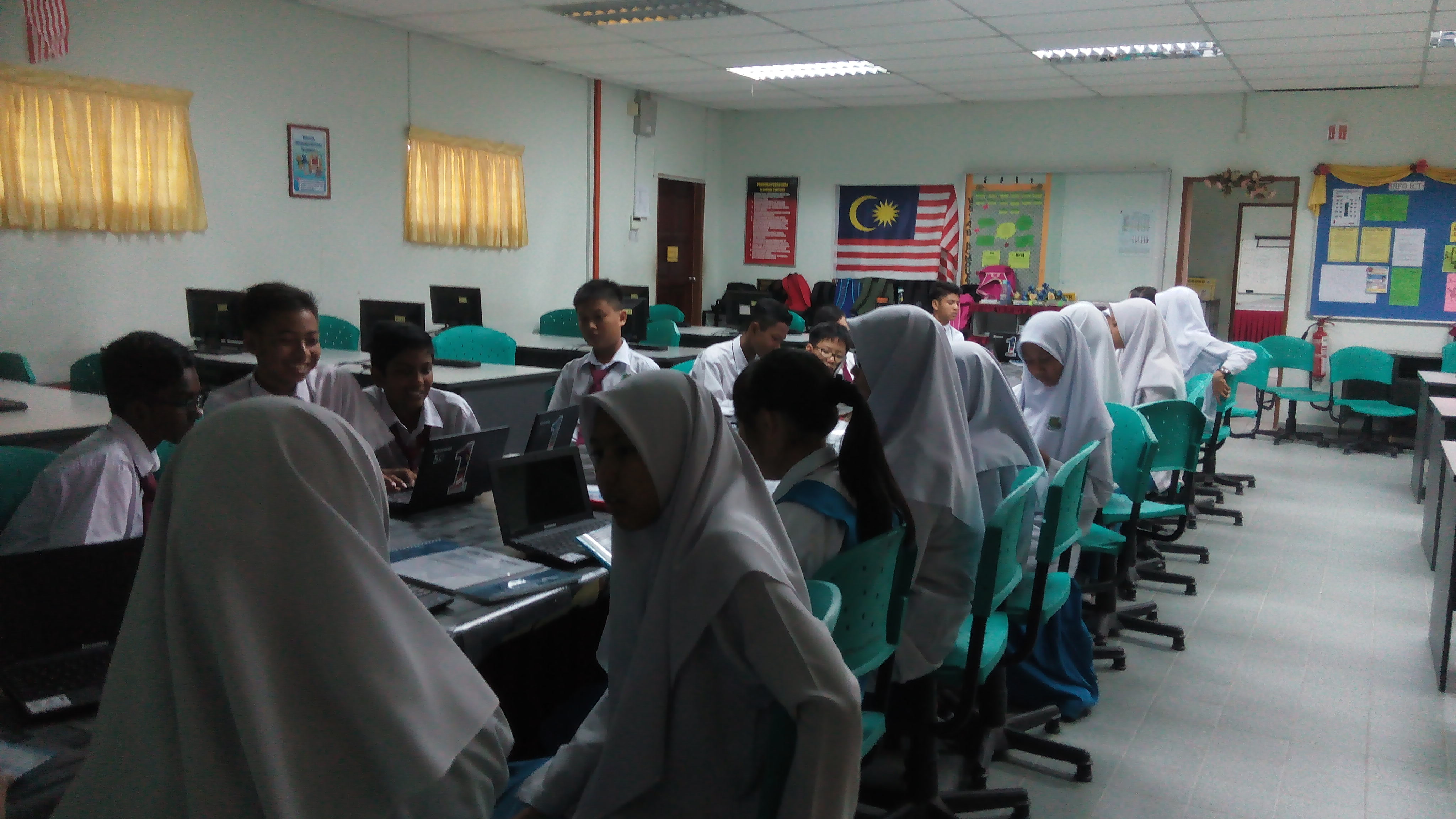 Pelajar menggunakan Makmal Komputer dengan baik